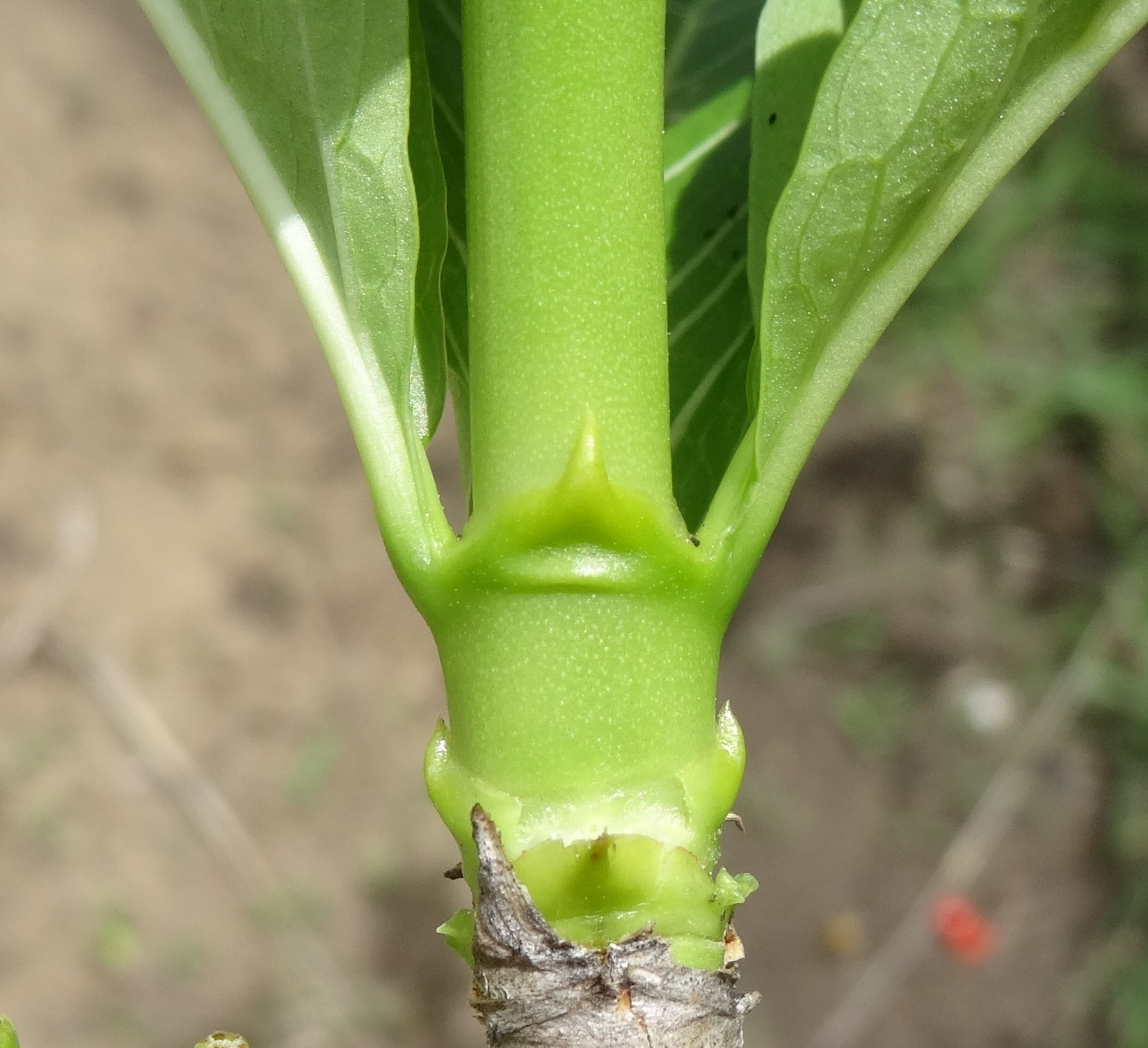 Interpetiolar stipule - Rubiaceae family